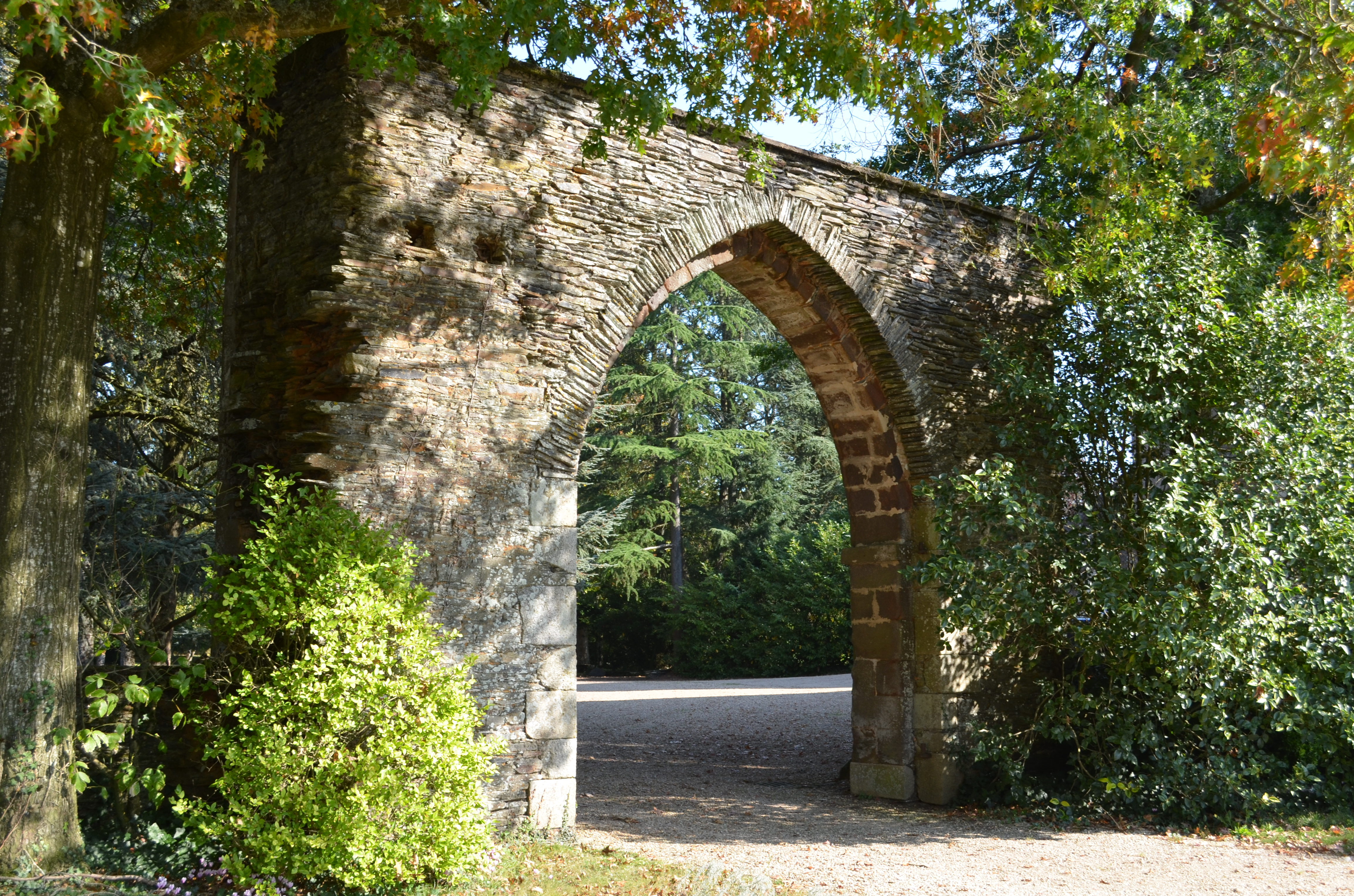 Abbaye Notre-Dame de Melleray - La Meilleraye-de-Bretagne (Loire-Atlantique) This building is en partie classé, en partie inscrit au titre des Monuments Historiques. .